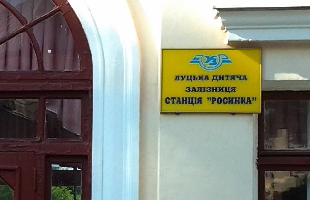 Луцька дитяча залізниця, 2016 рік.